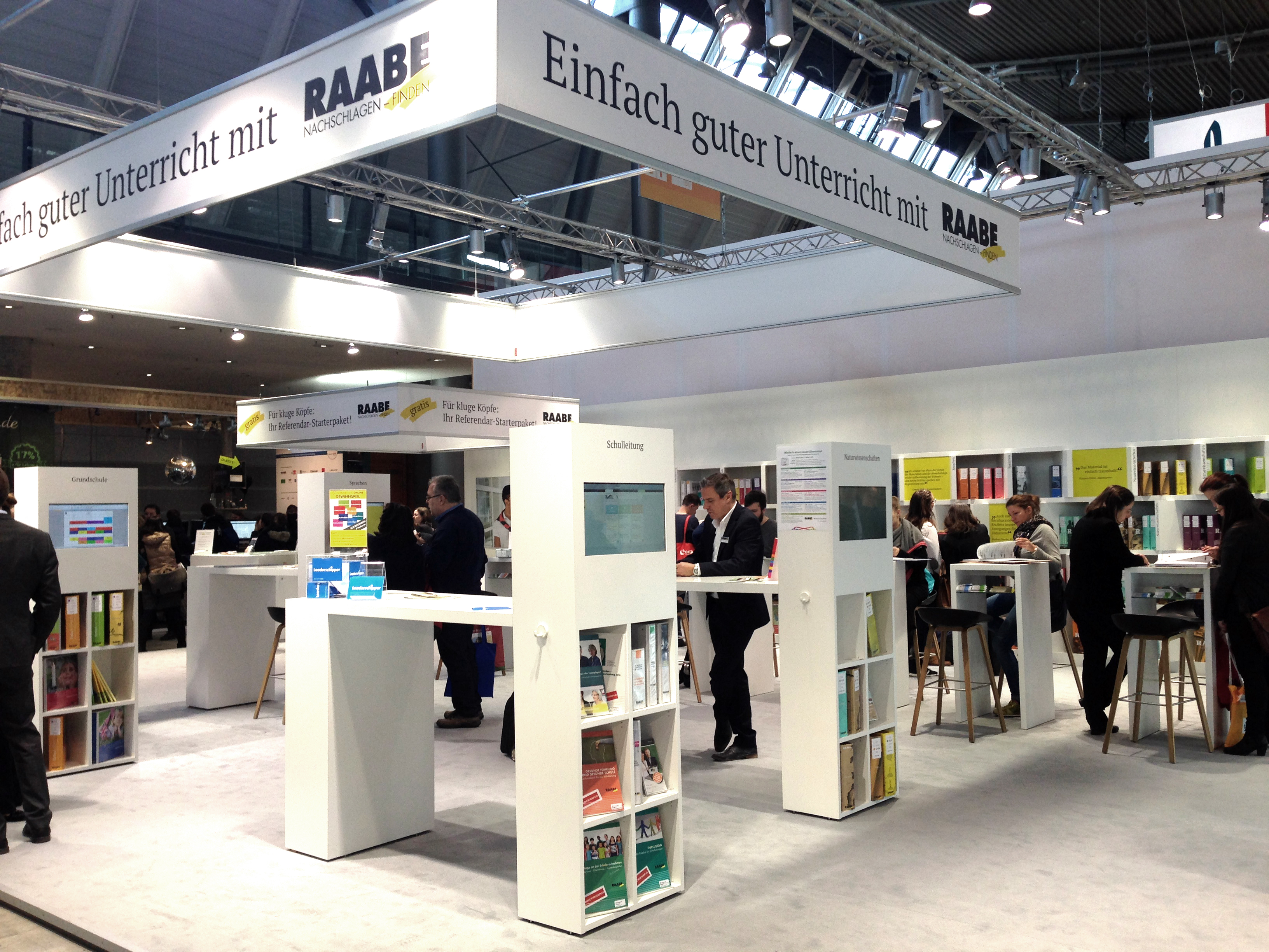 Der Messestand des Raabe-Verlags auf der didacta 17 in Stuttgart.